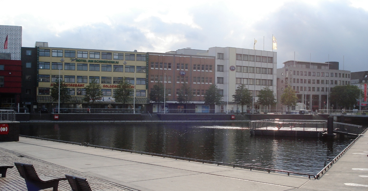 Der Kieler Bootshafen